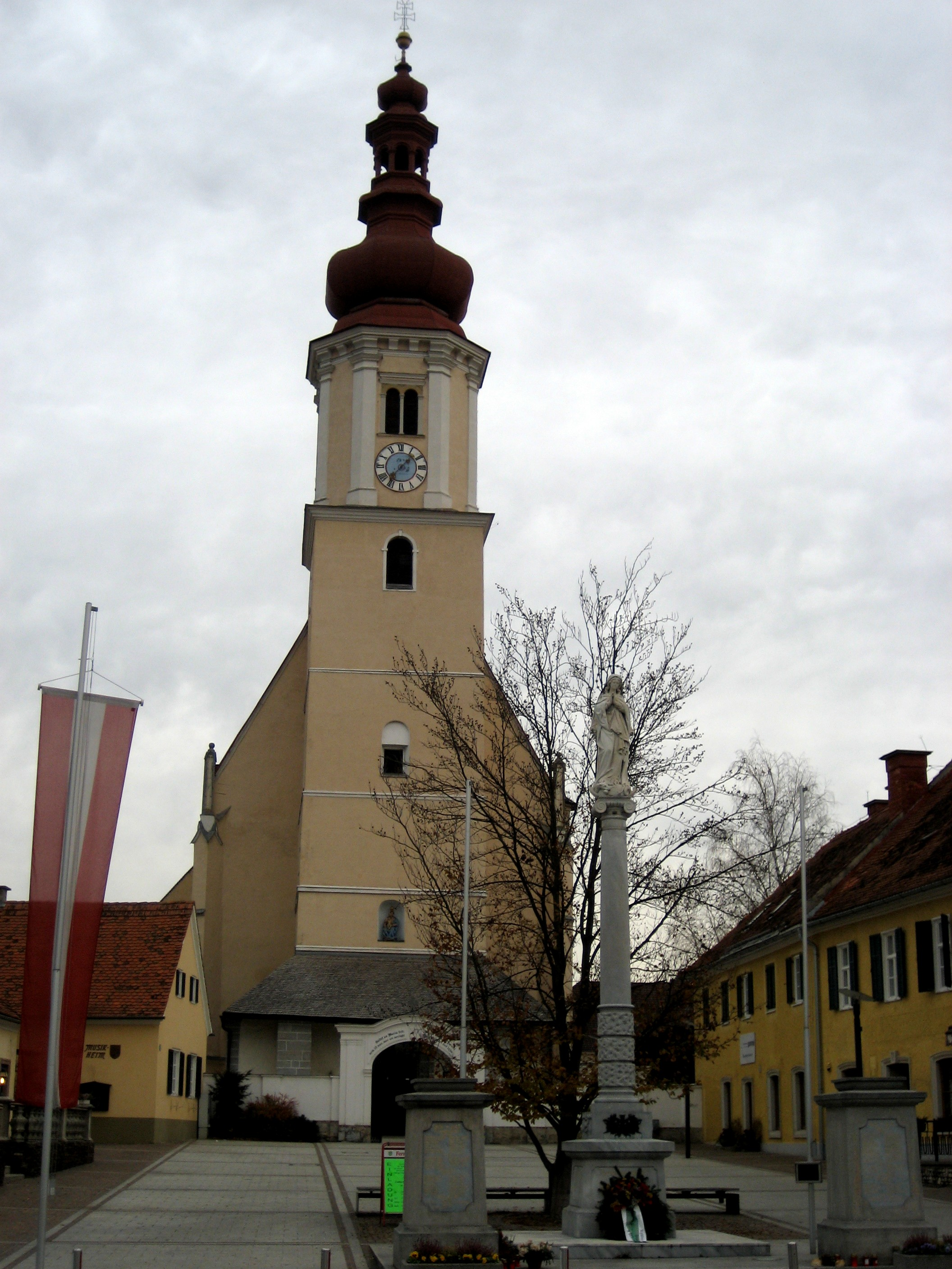 Wallfahrtskirche Maria Trost in Fernitz, Steiermark, Österreich / Church Maria Trost in Fernitz, Styria, Austria